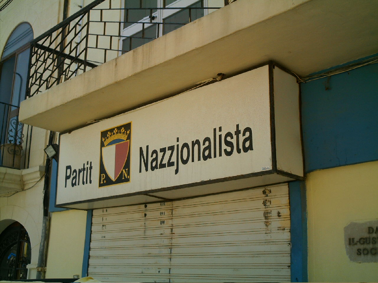 Sede del Partido Nacionalista en Marsaxlokk (Malta).